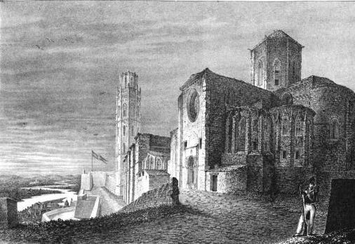 Exterior de la catedral antigua. Lérida.